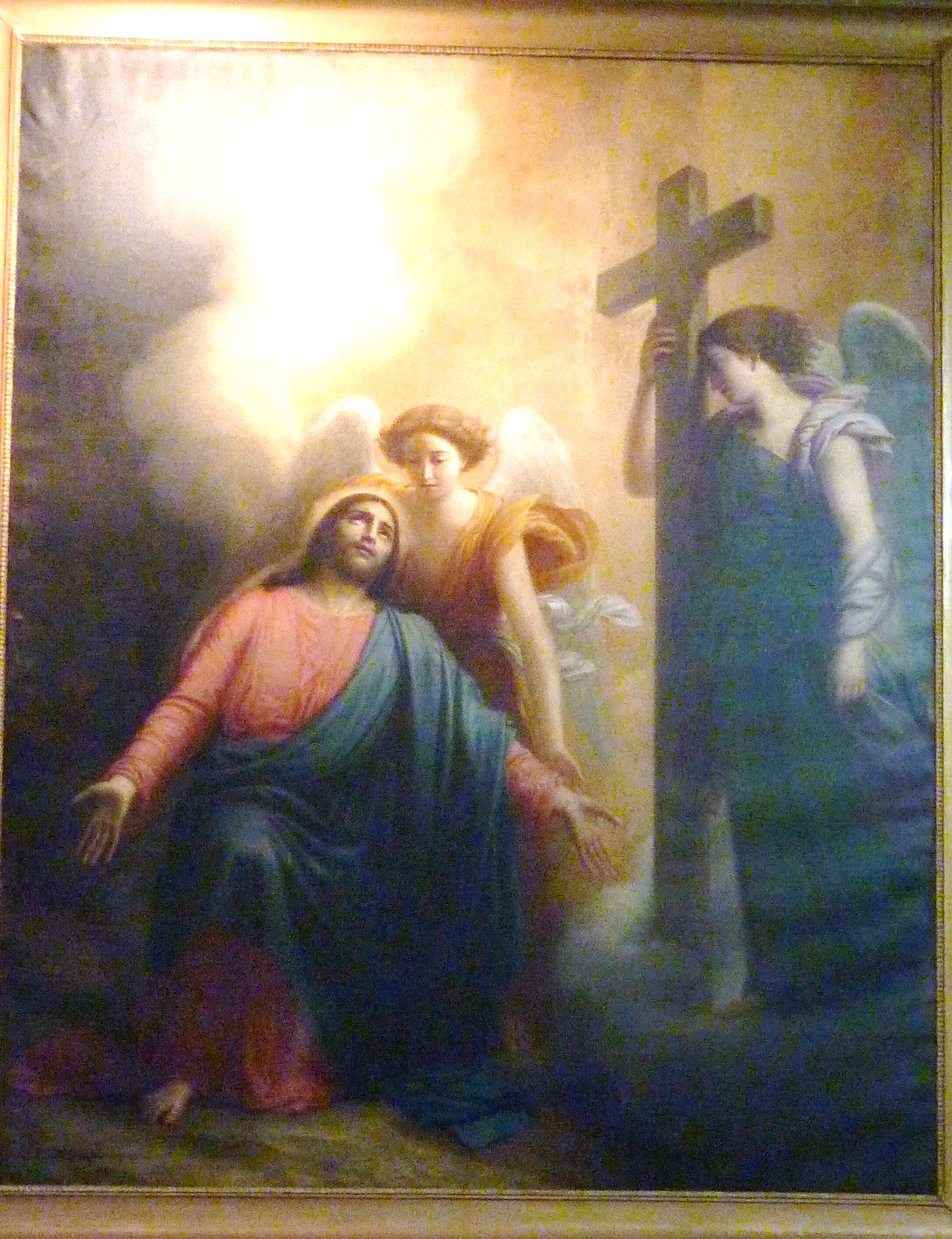 Tableau de Thomas Degeorge le Christ au Jardin des Oliviers (église de Sancerre)